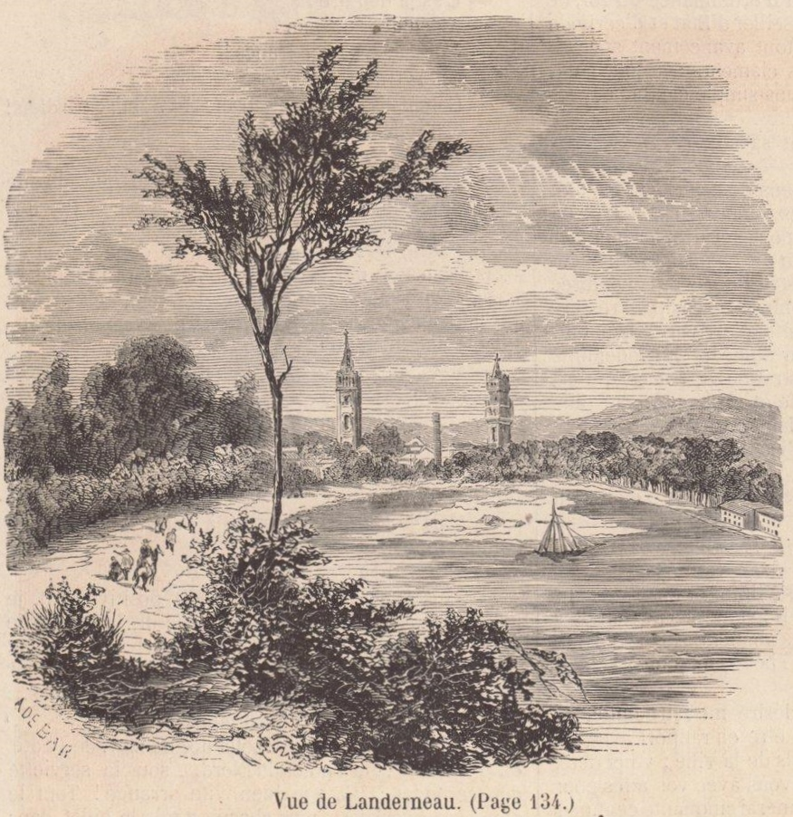 Vue de Landerneau en 1858 (dessin publié à l'occasion de la visite de leurs Majestés impériales en août 1858)